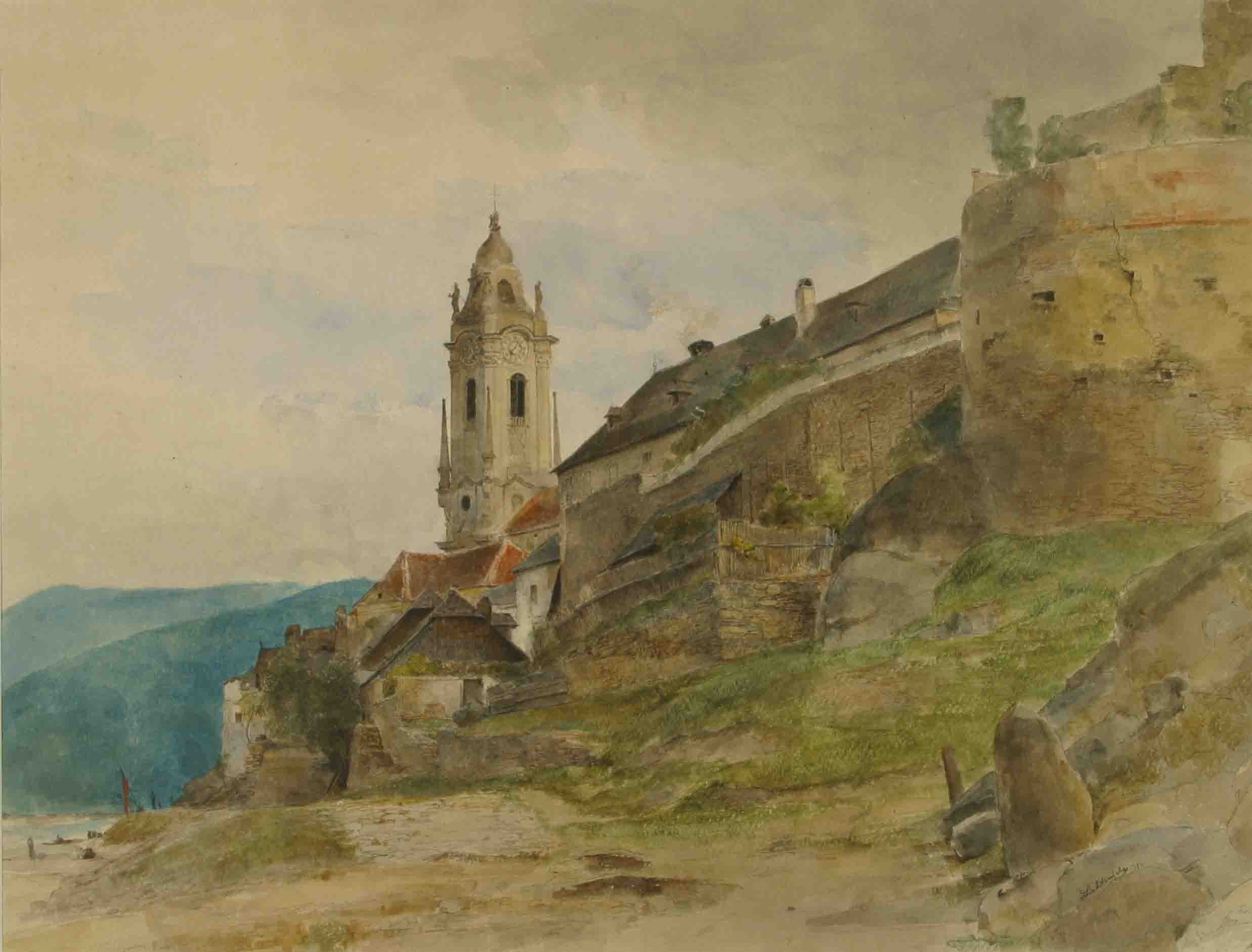 Blick auf Dürnsteintitle QS:P1476,de:"Blick auf Dürnstein" label QS:Lde,"Blick auf Dürnstein"